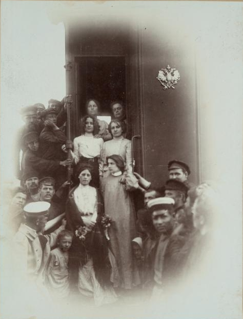 Las terroristas Reveka Fialka, Lidia Ezerskaya, Anastasiya Bitsenko, Mariya Shkolnik, Aleksandra Izmailovich y Mariya Spiridónova en Omsk, camino de su exilio siberiano, el 30 de junio de 1906.